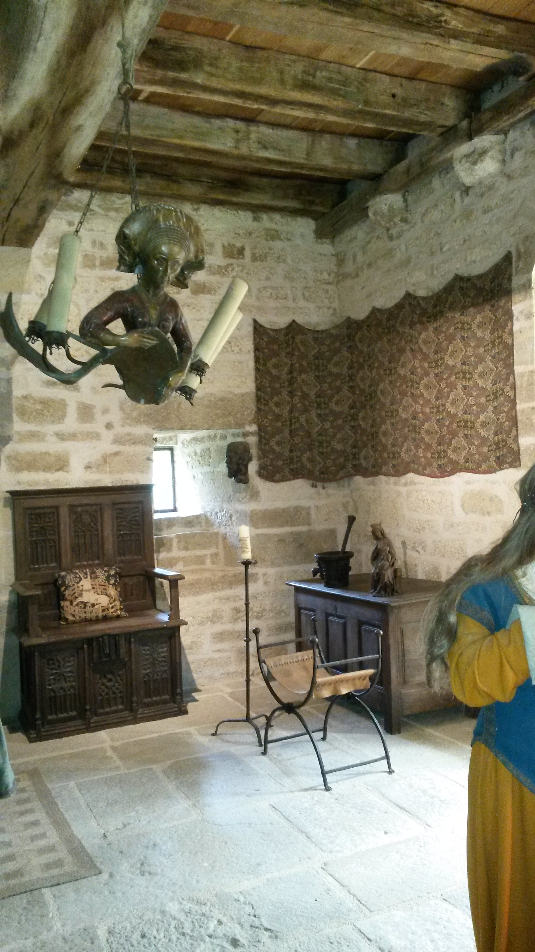 Ĉambro en la muzeo en la ĉefturo de la kastelo